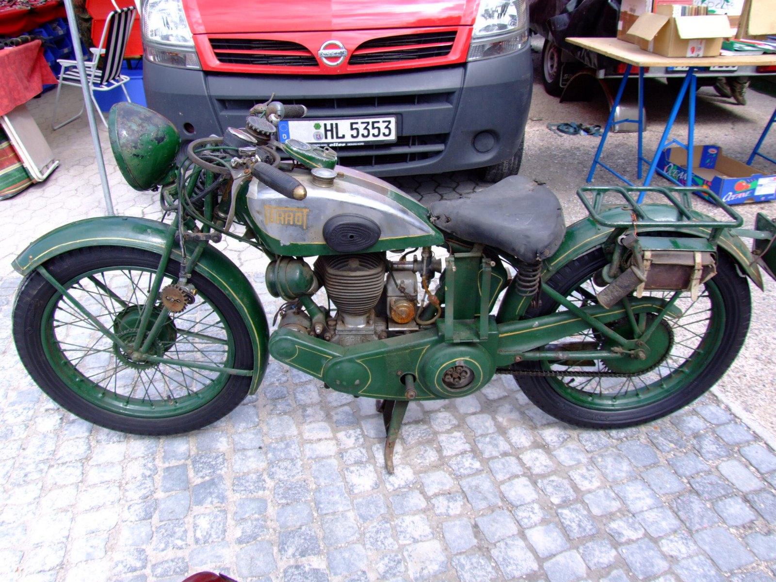 Terrot 250ccm 1931